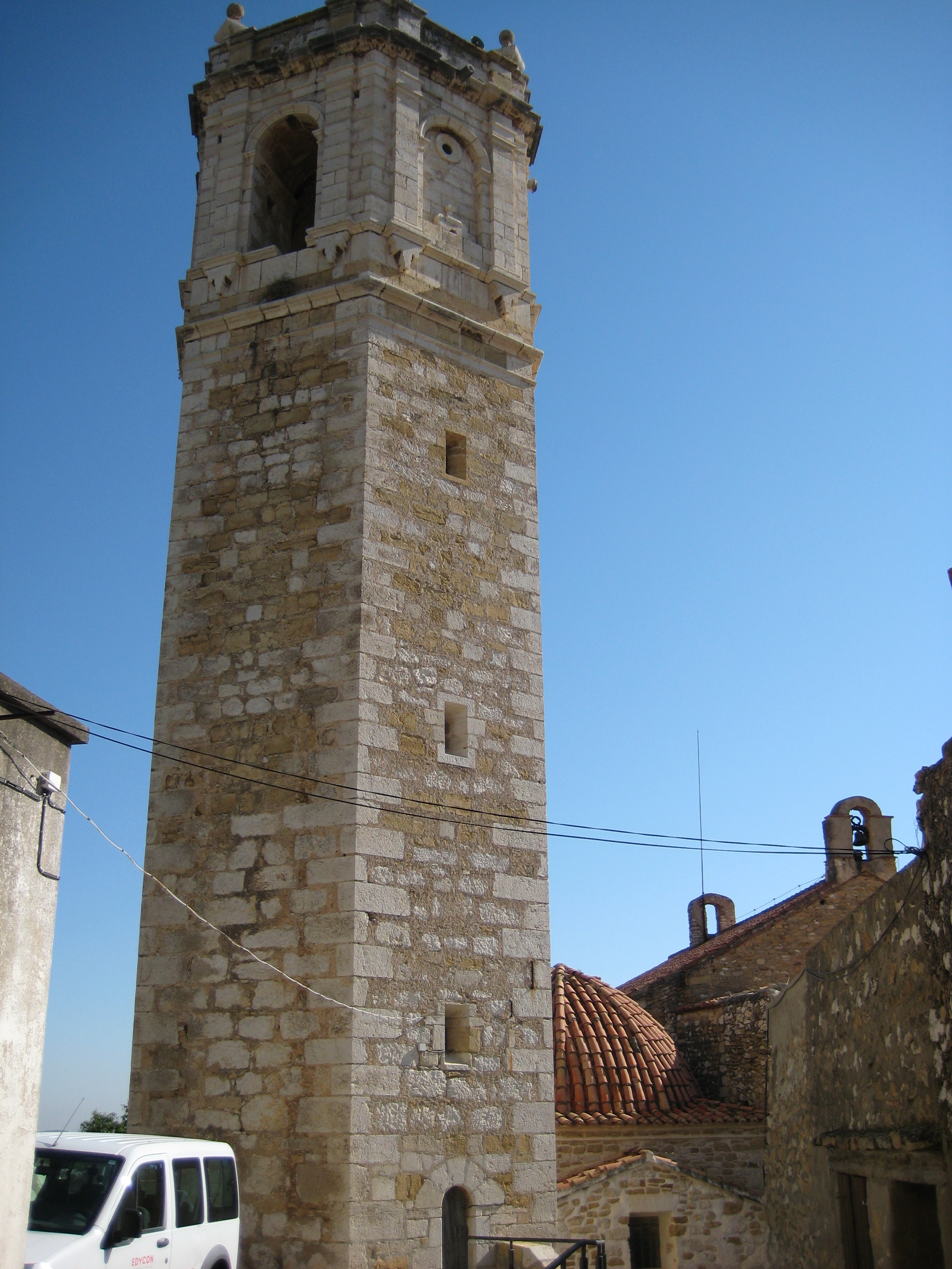 Torre-campanar de l'església de l'Assumpció de Cervera del Maestrat (Baix Maestrat)